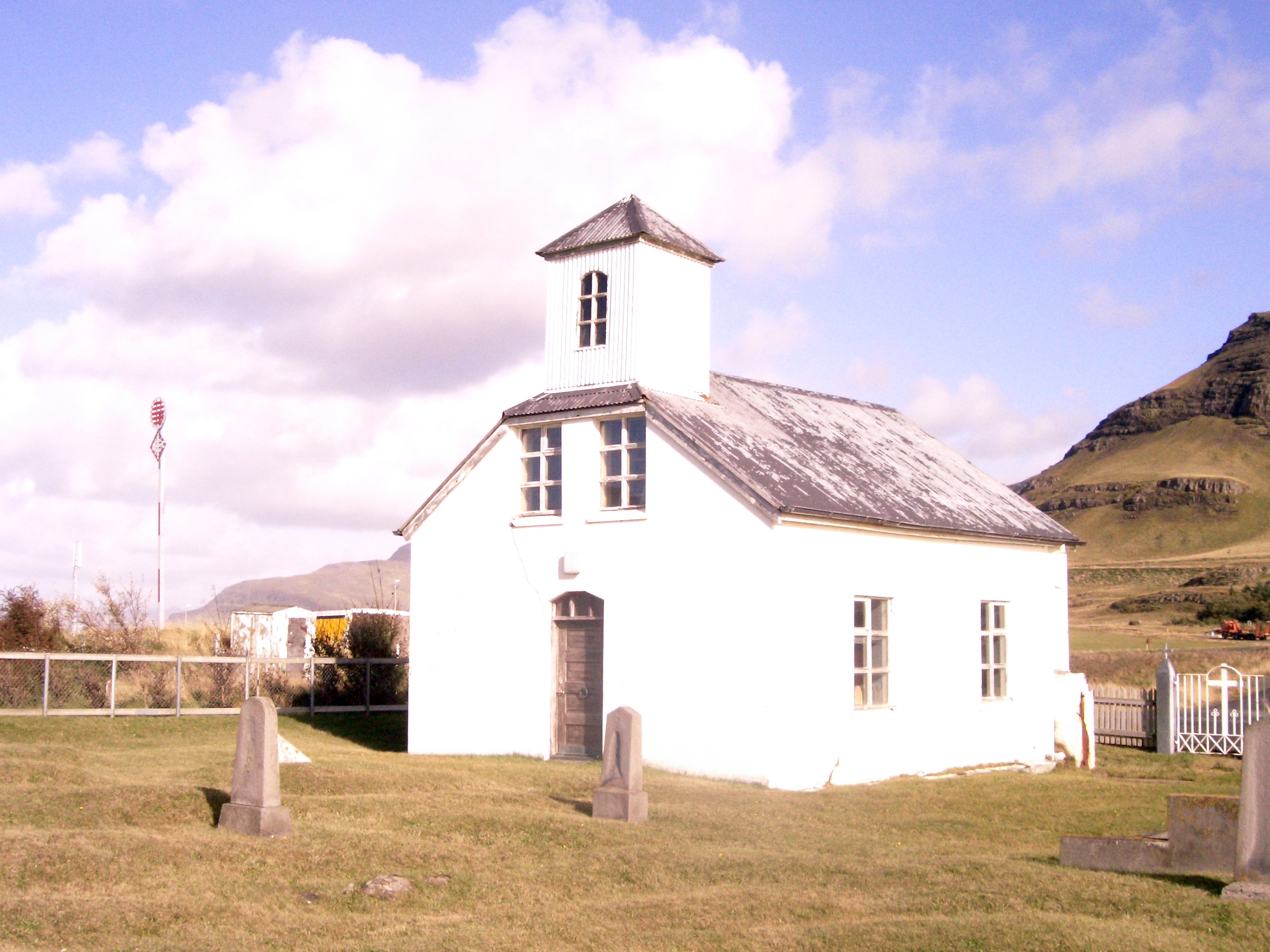 Saurbæjarkirkja á Kjalarnesi er í Reynivallaprestakalli í Kjalarnesprófastsdæmi. Saurbær er ævaforn kirkjustaður og löngum höfðingjasetur. Saurbæjarkirkja er steinkirkja vígð á jóladag 1904. Saurbæjarkirkja er steinkirkja vígð á jóladag 1904.